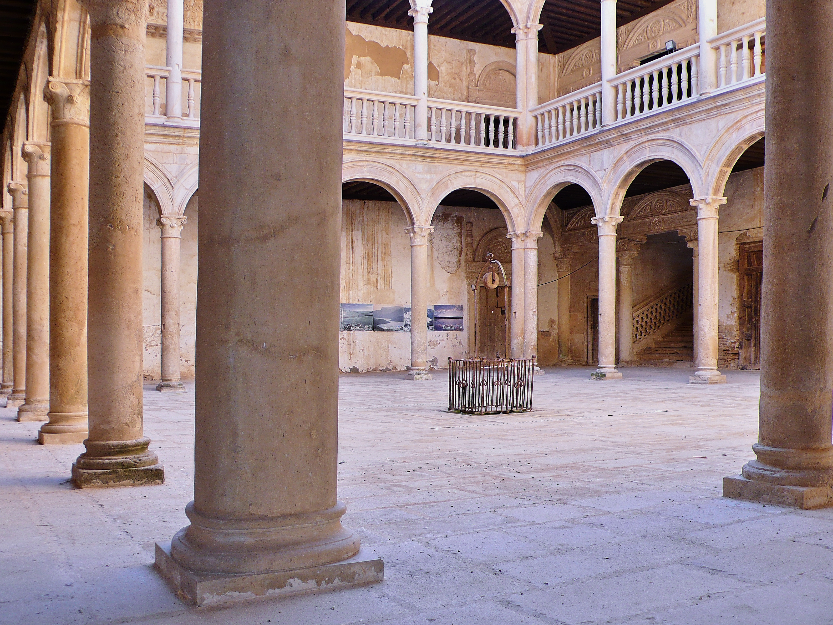 Patio renacentista (1517-1526) Intervienen (¿los lombardos?) Cristóbal y Lorenzo de Aldonza (o Adongo). Don Juan de Vega fue embajador ante la Santa Sede y Virrey de Sicilia. Entre 1552 y 1556 enriquece la edificación con las nuevas corrientes renacentistas.